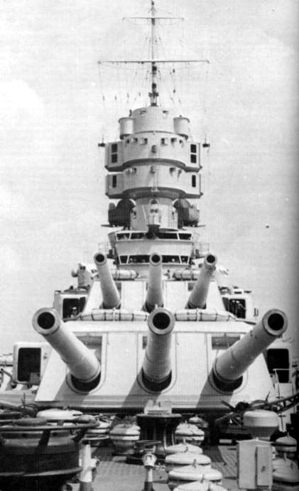 I cannoni prodieri da 381mm/50 della corazzata Vittorio Veneto